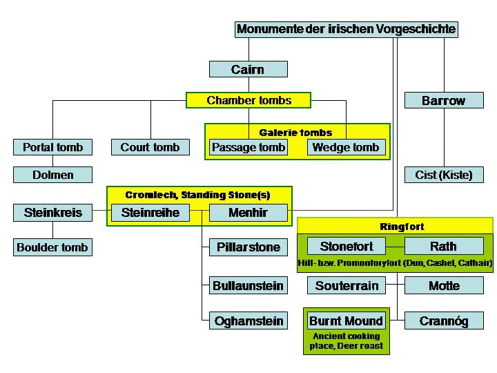 Vorg. Irland